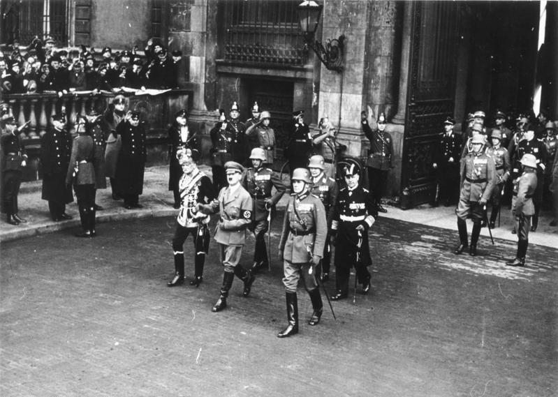 Heldengedenktag in Berlin 1935. v.lks. Mackensen, Hitler, Blomberg beim Verlassen d[er] Staatsoper nach der Gedenkfeier durch Reichskriegsminister v. Blomberg. [2. Reihe v.l.: von Fritsch, Göring, Raeder]